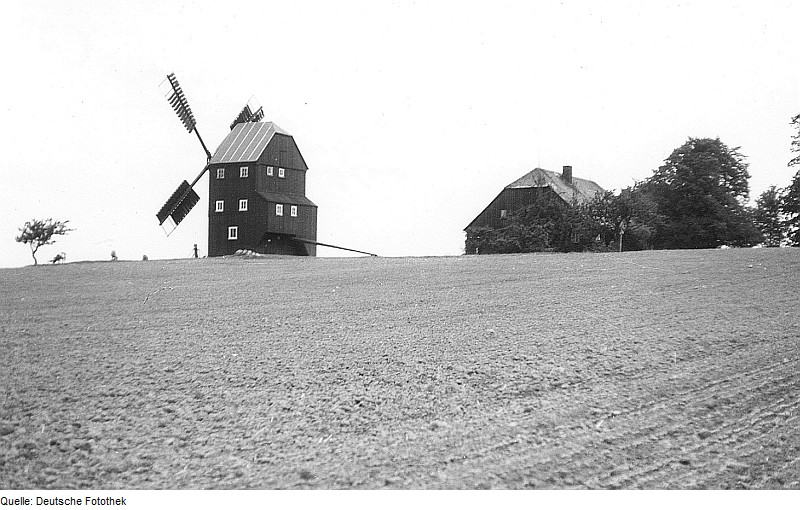 Original image description from the Deutsche Fotothek Obercunnersdorf-Kottmarsdorf. Burkmühle, Blick zur Mühle